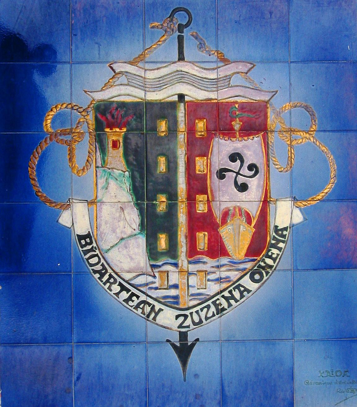 Bidart, le blason. Photo prise le 03/06/05 par Harrieta171, d'une céramique ornant un des murs de la mairie de Bidart.